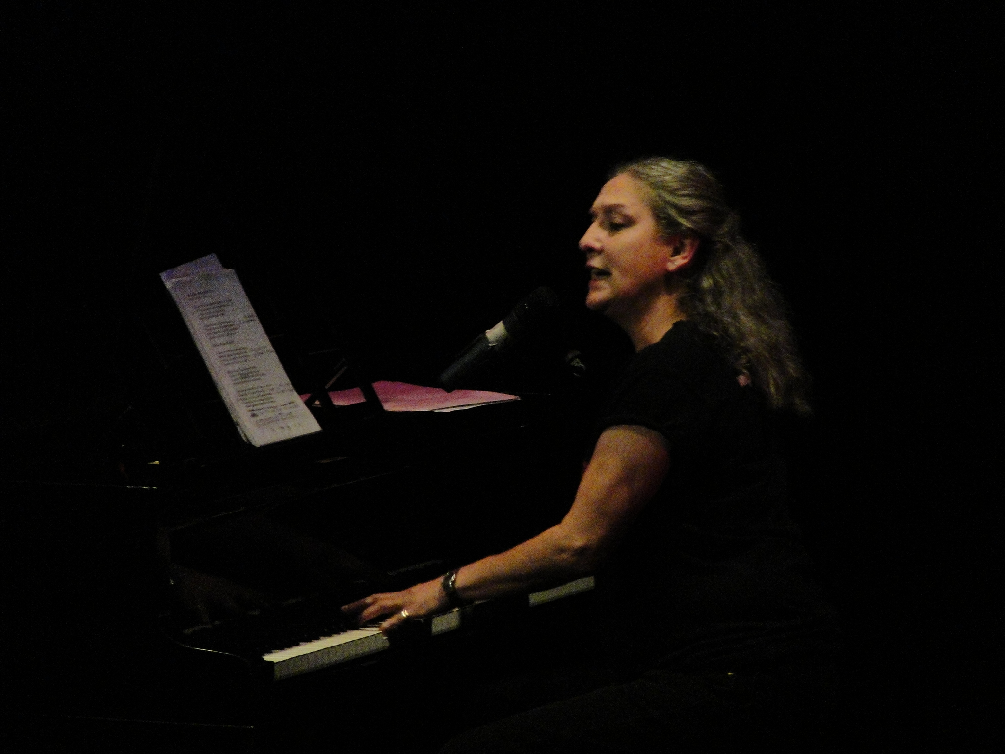 Liliana Felipe en concierto con Charles Darwin en el marco del Festival Internacional Santiago a Mil. Teatro Mori, Subsuelo de Boulevard Parque Arauco, Av. Presidente Kennedy 5413, Santiago, Chile.